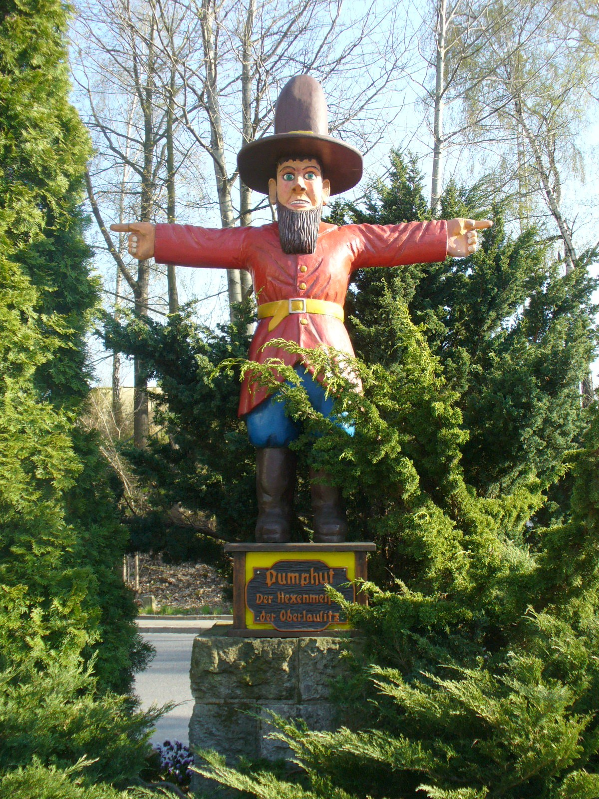 Martin Pumphut. Standort Wilthen Bahnhofstraße